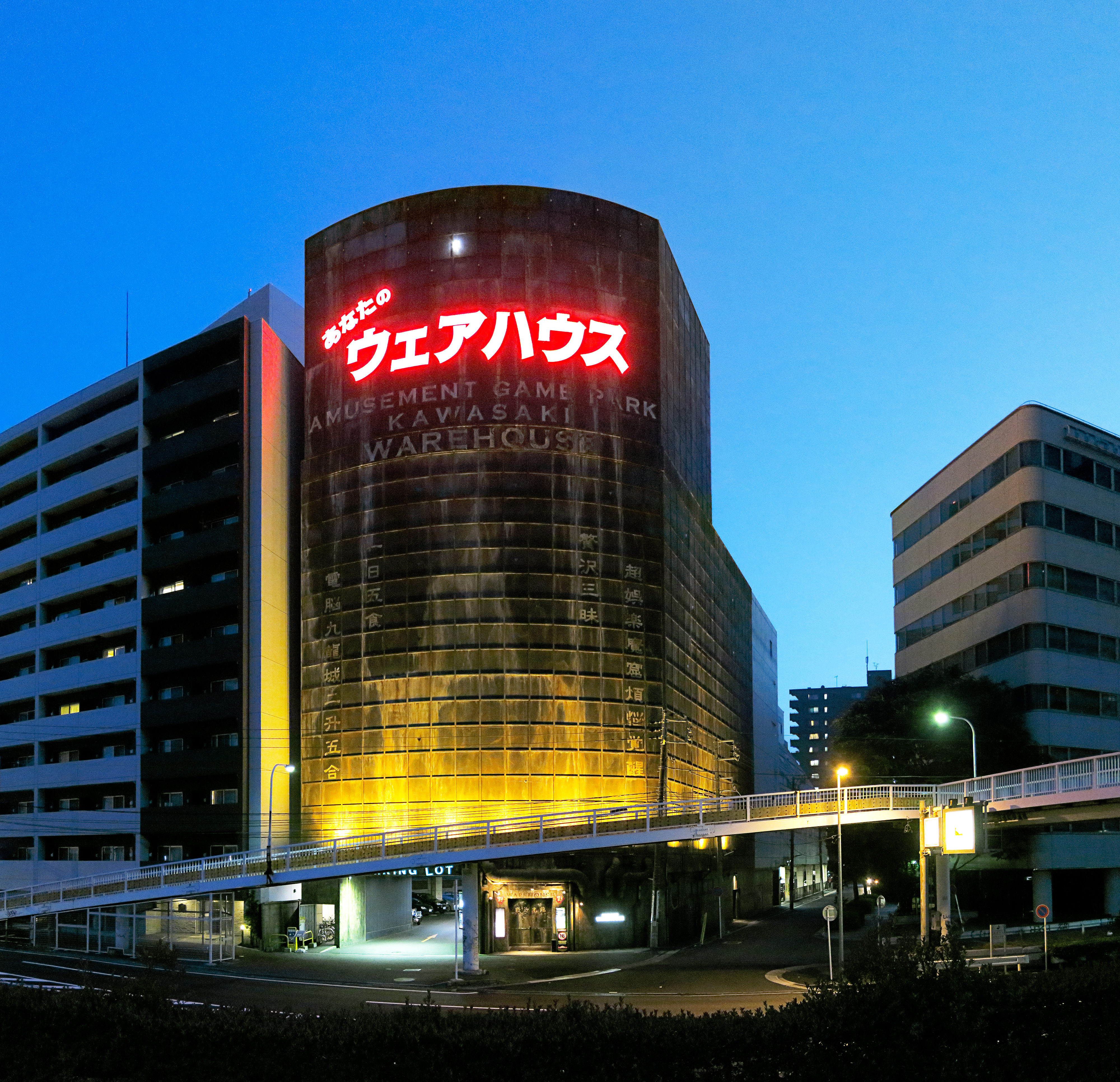 電脳九龍城